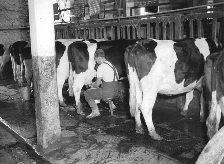 Mönchshof-Mendhausen, Bauer beim Melken Zentralbild TBD-Wjt-Qu 22.9.1955 -3177- Ein Industriearbeiter auf dem Land. Familie Jäger lebt glücklich in der LPG Mönchshof-Mendhausen. Der Maschinenarbeiter Reinhold Jäger arbeitete in Hildburghausen bei der "Tawa". Im Frühjahr 1955 folgte er dem Aufruf: "Industriearbeiter aufs Land". Reinhold Jäger, der gelernter Schweizer ist, erhielt vom Staat 6 ha Land, die er in die LPG "Solidarität", die nach dem Typ III arbeitet, einbrachte. 2 Morgen Land erhielt er zur persönlichen Nutzung. In der LPG arbeitet Reinhold Jäger als Viehzuchtbrigadier. Er verdient ca. 70 Arbeitseinheiten zu 11.- DM im Monat, die zu 70% sofort ausgezahlt werden. Weiterhin erhält er wie jedes Mitglied der LPG Anteile an Getreide, Kartoffeln, Heu und Rüben. Dadurch kann Familie Jäger selbst noch einiges Vieh halten. Zum Jahresabschluß werden von der LPG die restlichen 30% der Arbeitseinheiten und des Genossenschaftsanteils für das eingebrachte Land ausgezahlt. So wird Reinhold Jäger Ende des Jahres noch einmal 2000.- DM erhalten. Machen Wunsch konnte sich die Familie Jäger auf dem Lande schon erfüllen. Die Kinder freuen sich schon jetzt auf Weihnachten, wenn sich Vati das Motorrad und Mutti die Nähmaschine kaufen. Die Jägers wollen in der ruhigeren Weihnachtszeit auch 14 Tage in den Urlaub fahren. UBz: Kollege Jäger bei seiner Arbeit im Kuhstall.